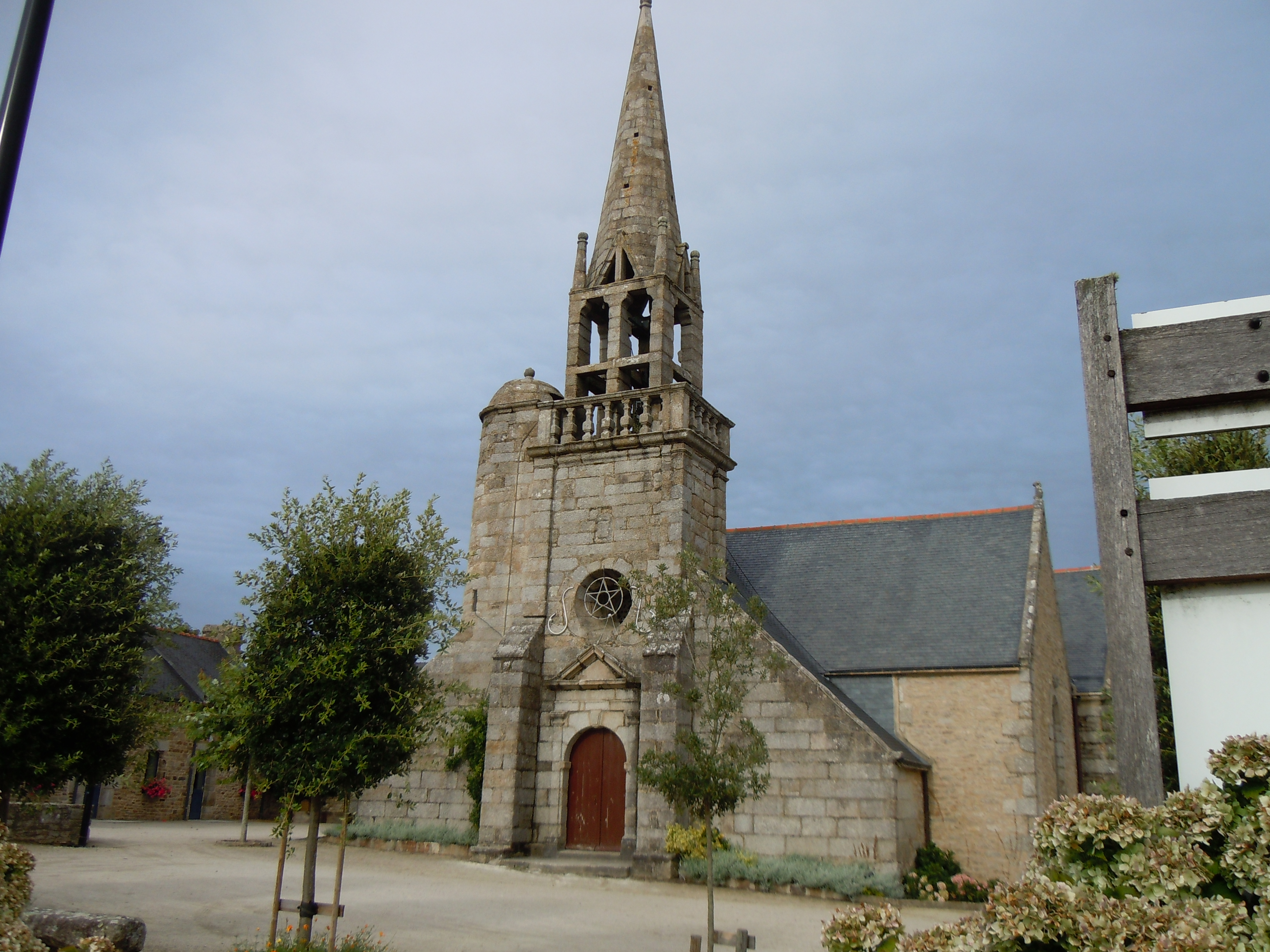 église de Nizon dédiée à Saint-Amet, commune de Pont-Aven, département du Finistère, France